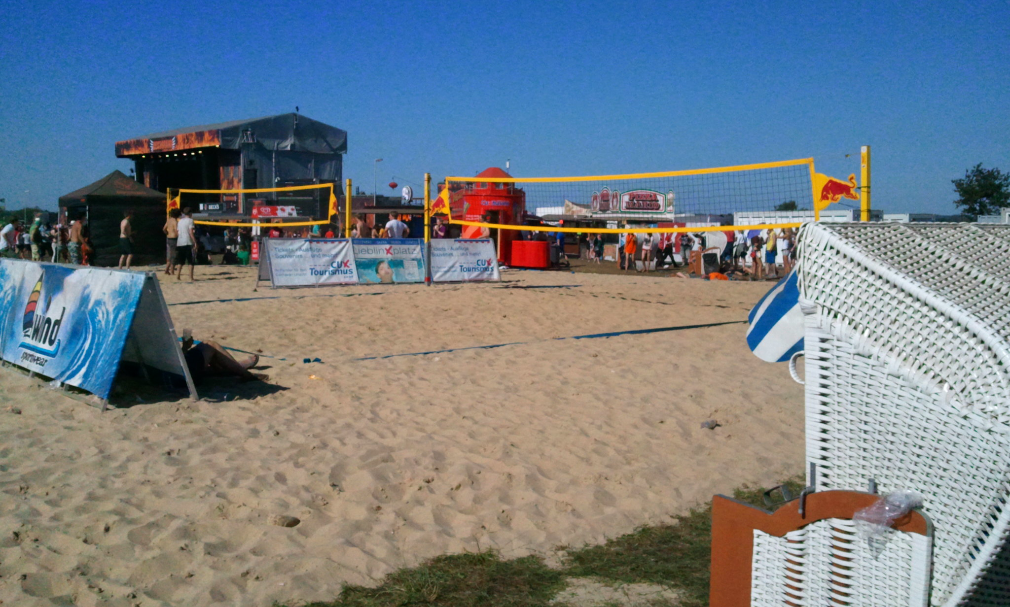 Deichbrand 2013: Fire Stage (fajroscenejo) malantaŭ ludejo de plaĝa flugpilkado